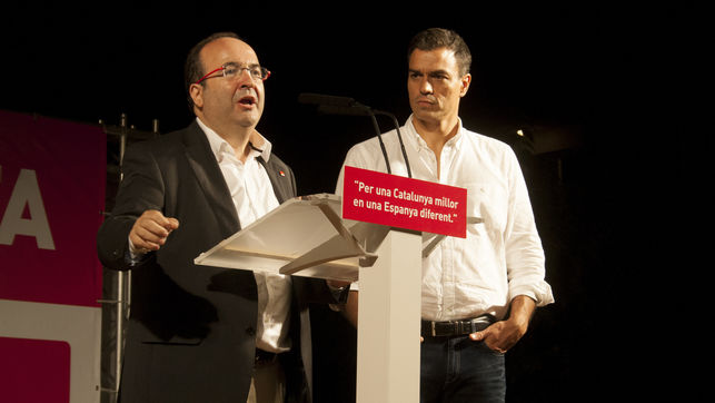 Miquel Iceta y Pedro Sánchez en un acto de Pineda de Mar.